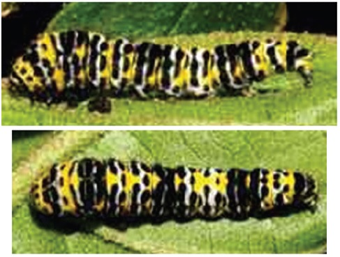 Ethmia dianemillerae